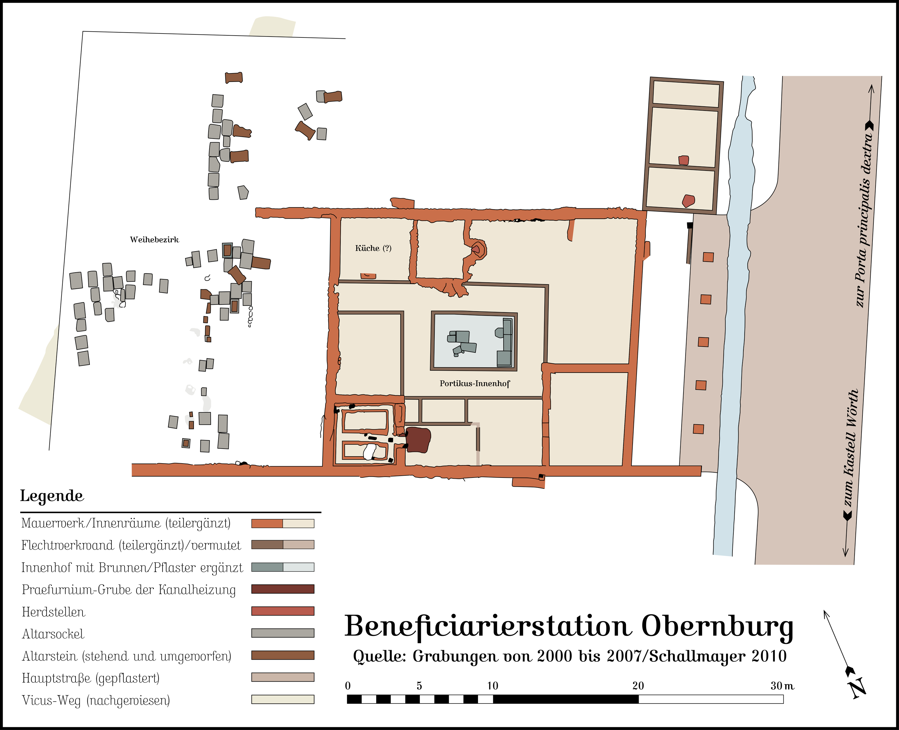 Die bis 2007 ergrabene Beneficiarierstation in Obernburg am Main.